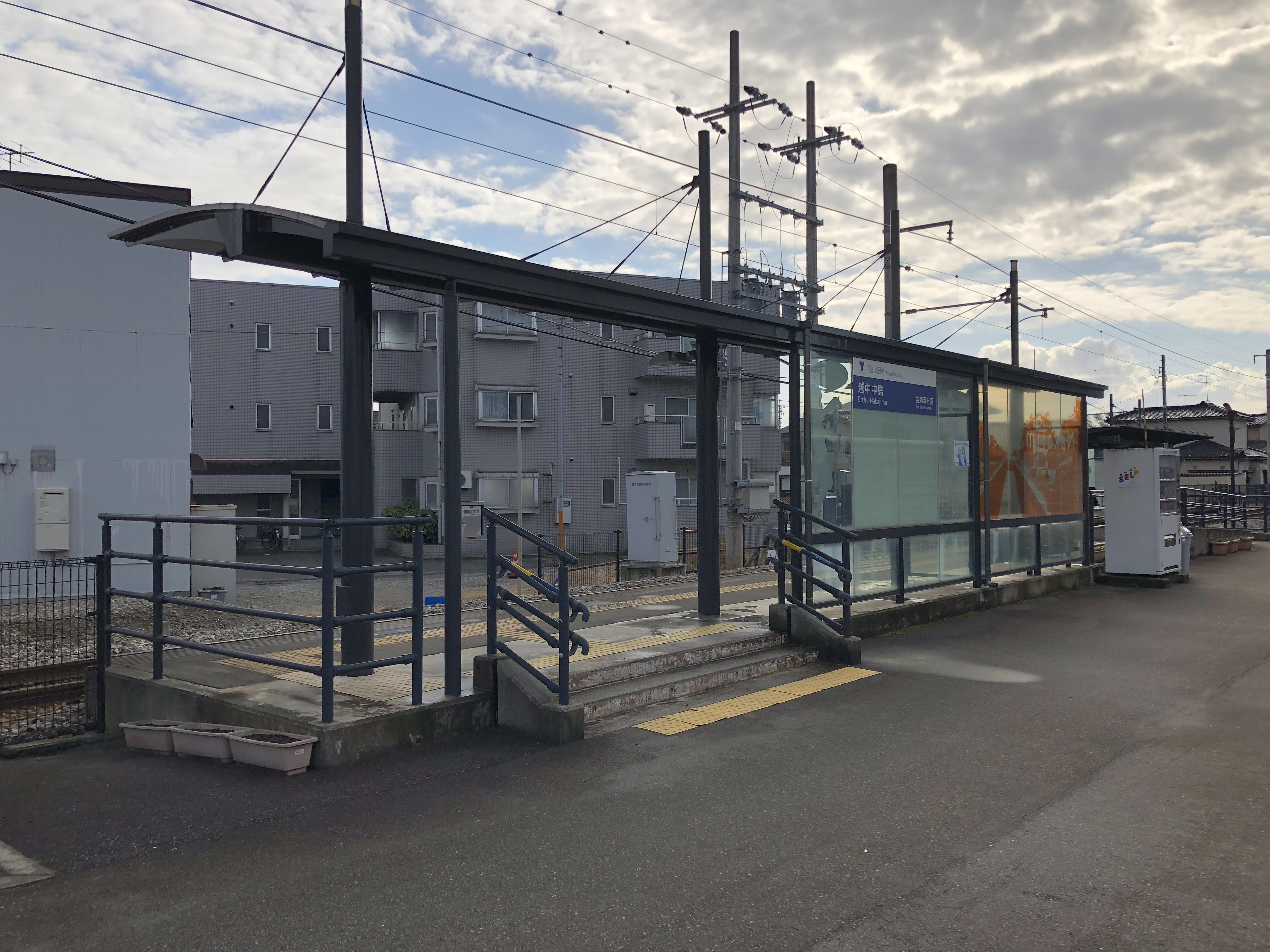 富山ライトレール富山港線越中中島駅